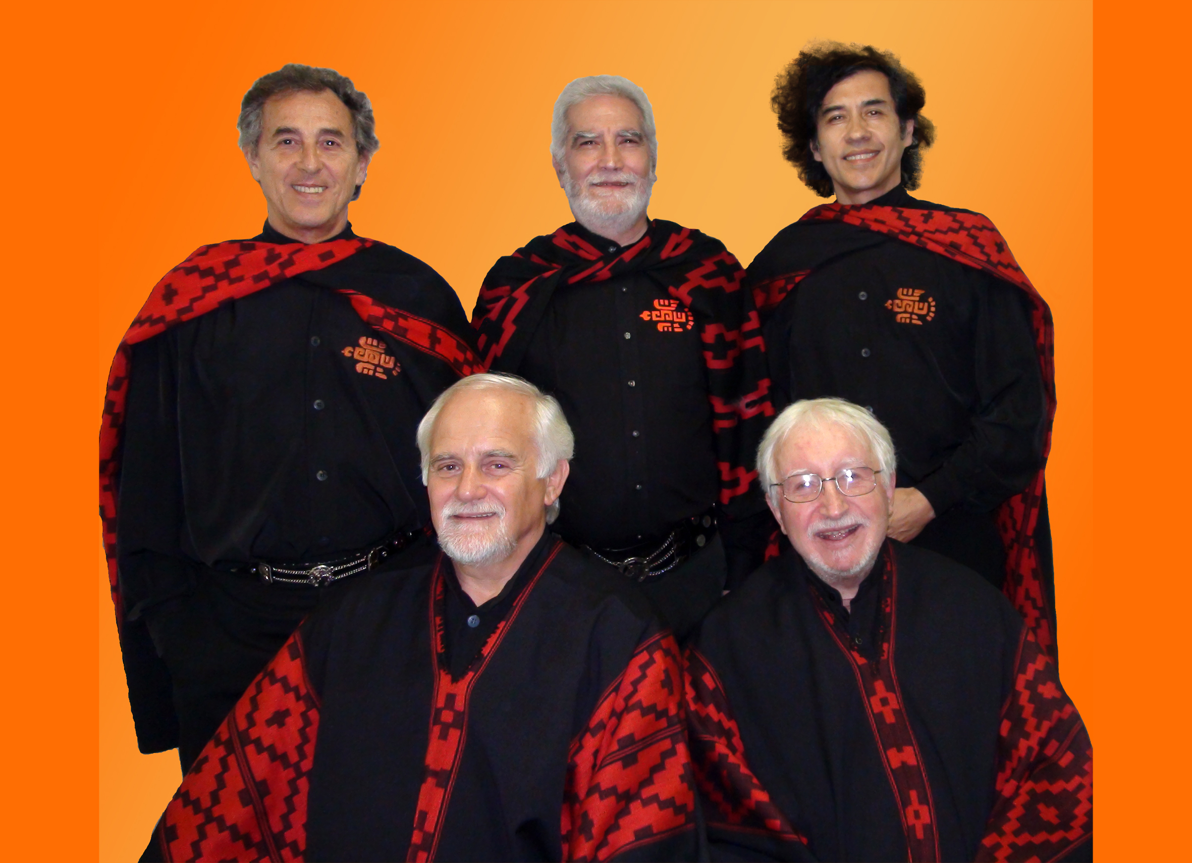 Photo du groupe mythique du folklore latino-américain